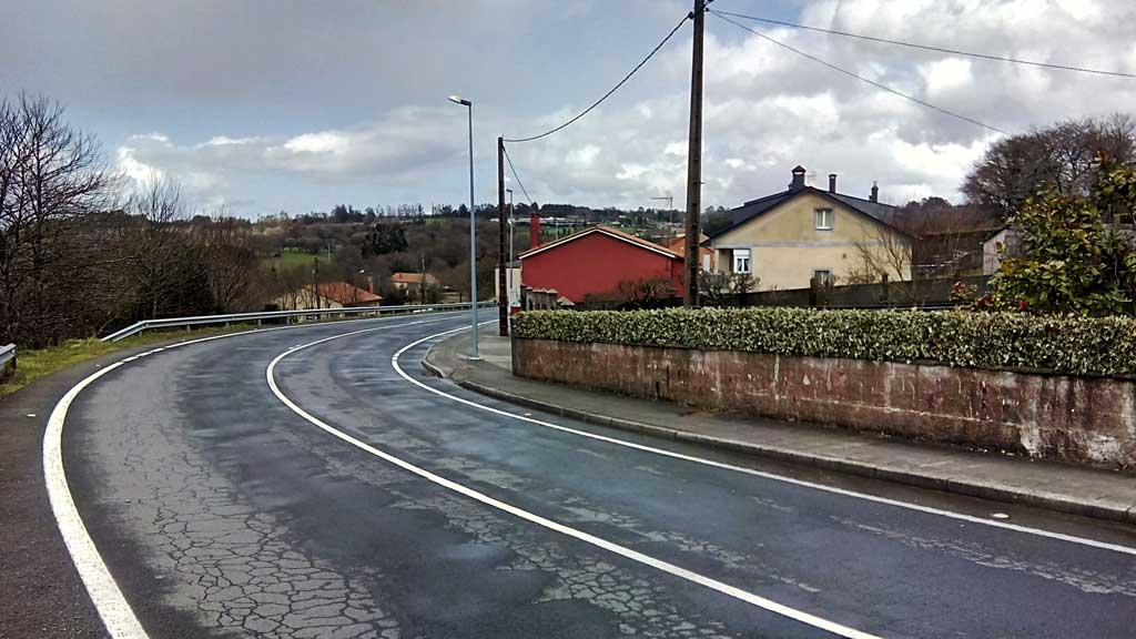 Vista de Seixo de Abaixo, Curtis.